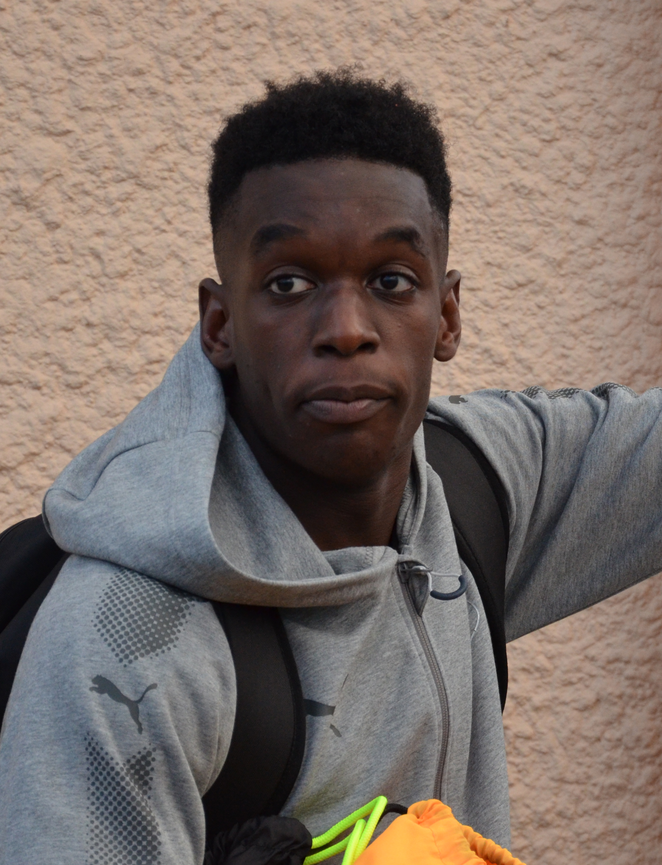 Photographie prise lors du match opposant le Stade rennais au SM Caen en match amical au stade Pierre-Compte de Vire le 22 juillet 2017. Ici, Faitout Maouassa.